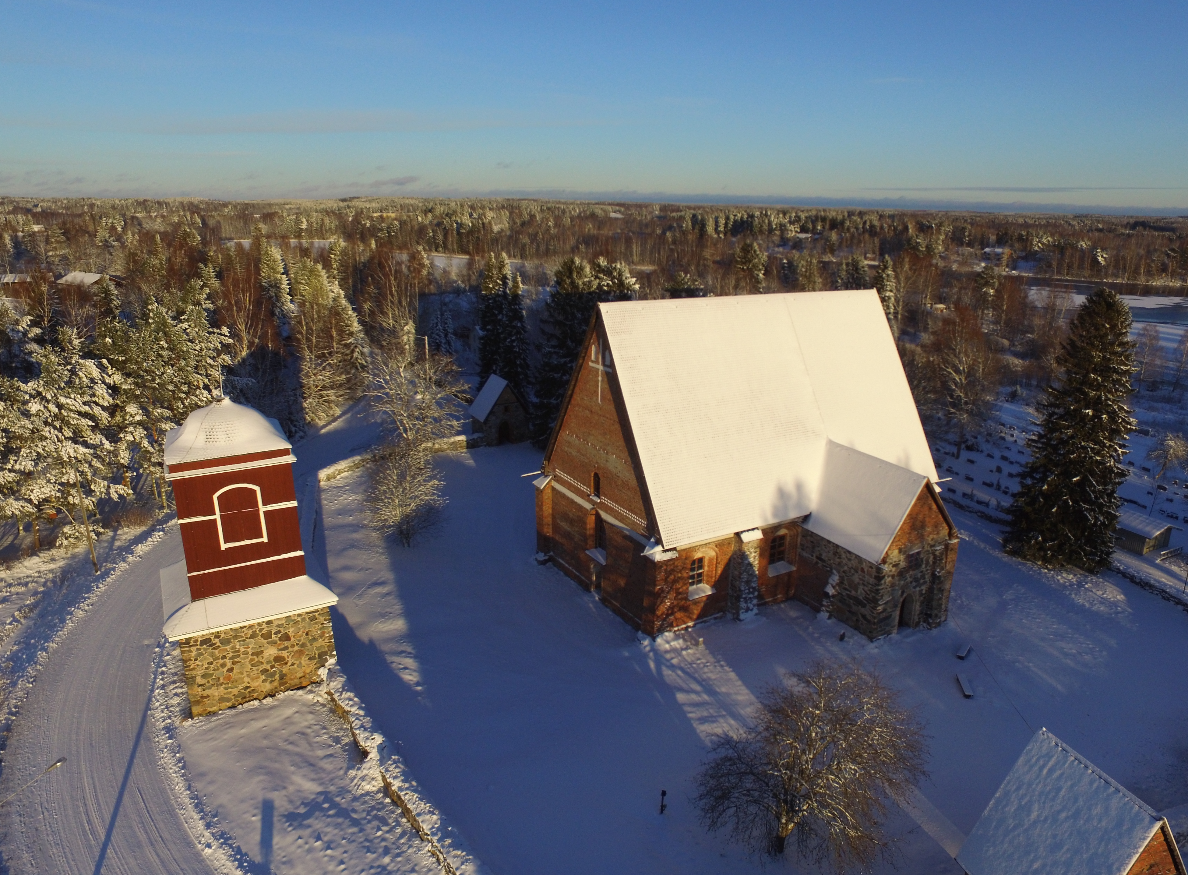 Pyhän Ristin kirkko Hattulassa talvisessa maisemassa, ilmakuva